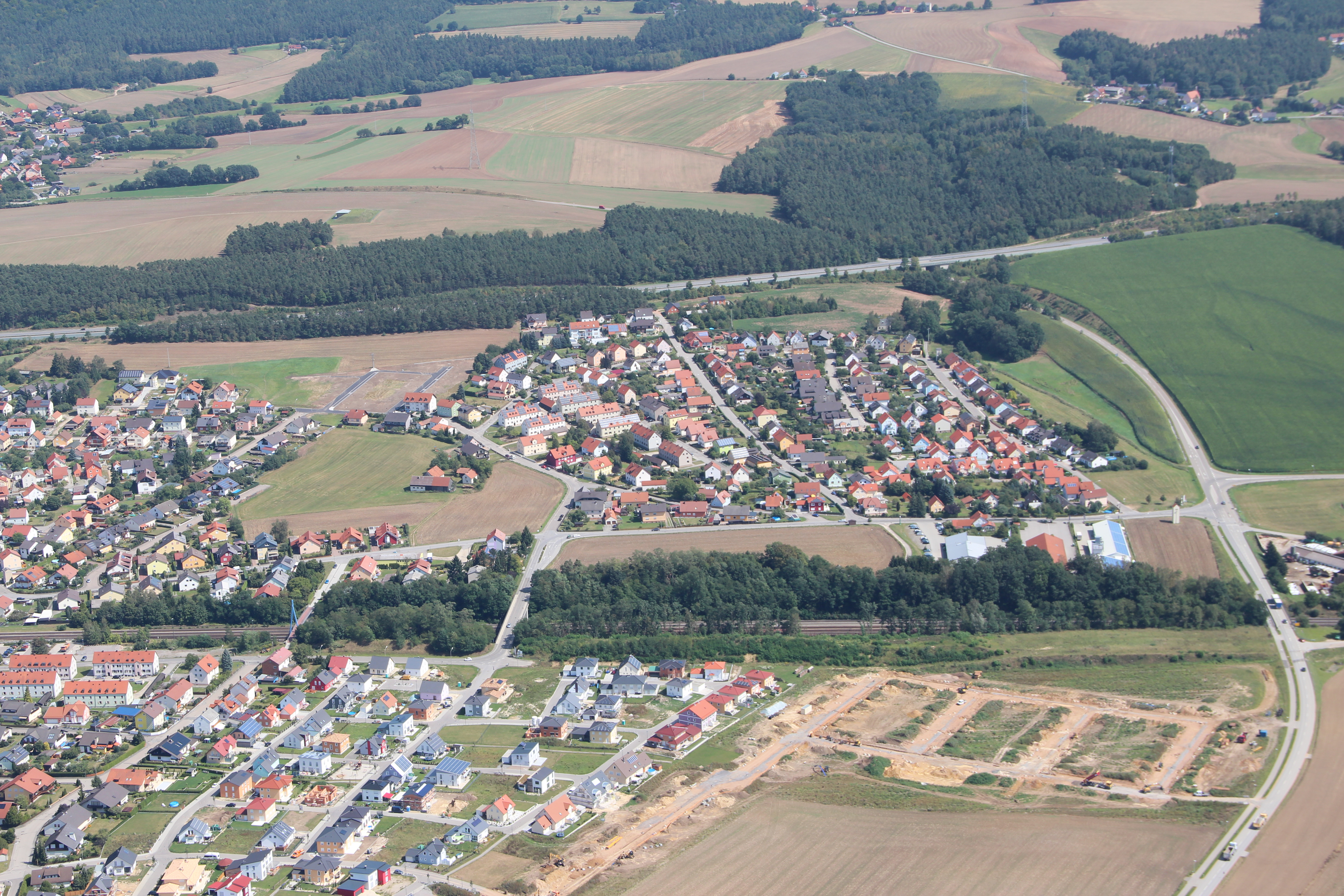 Maxhütte-Haidhof, Landkreis Schwandorf, Oberpfalz, Bayern (2012)